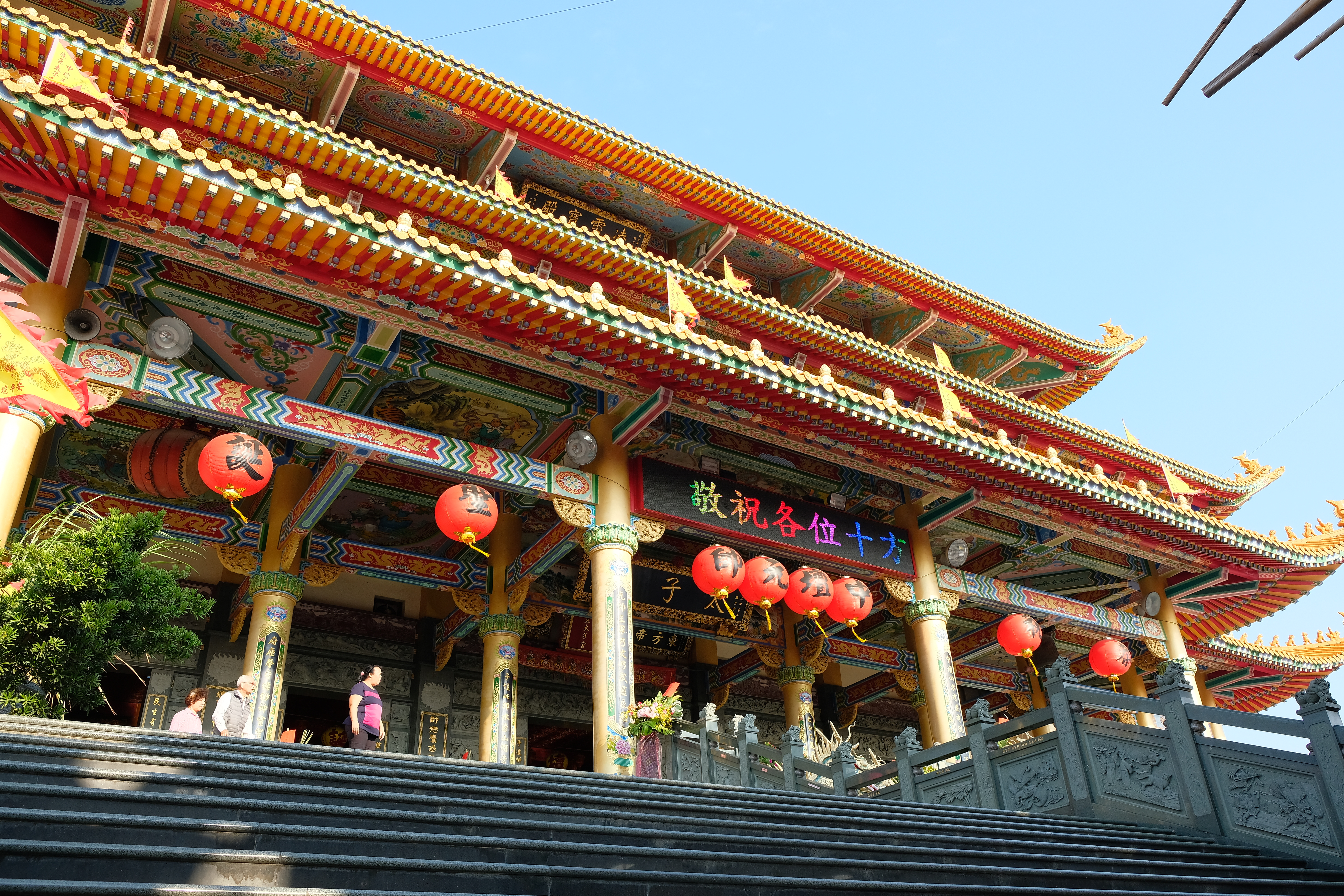 2018麻豆太子宮 Madou District, Tainan